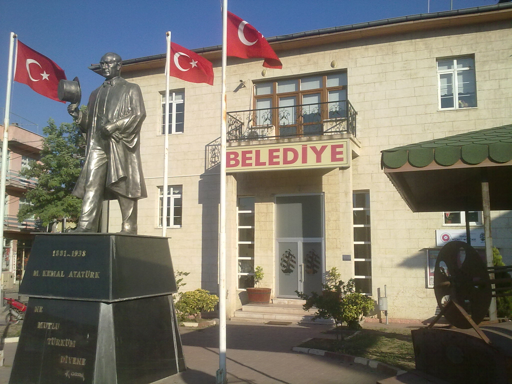 Balya Belediyesi